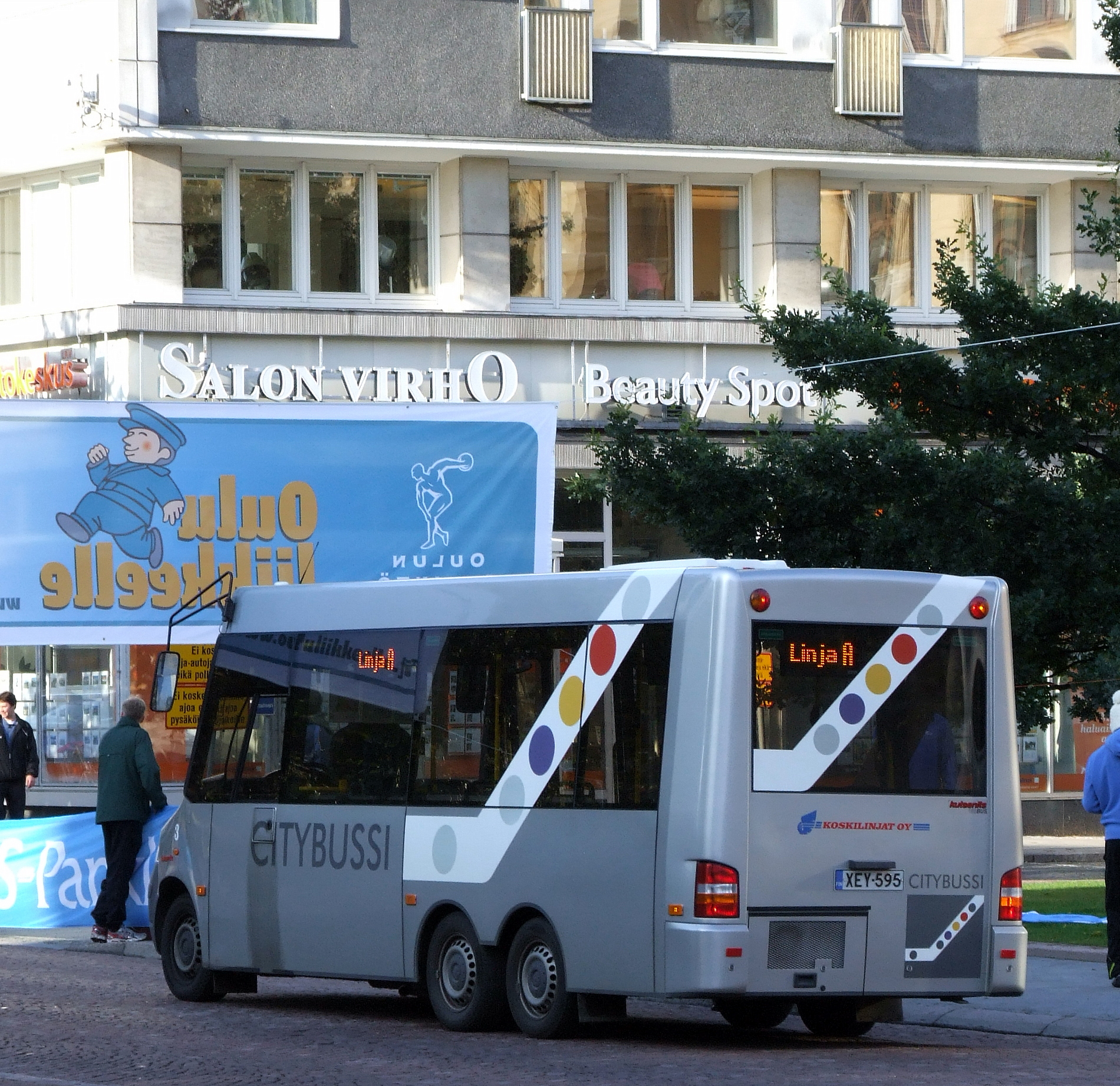 Koskinjat Oulu Citybussi (Kutsenits City VW Citybus) on Kirkkokatu street in Oulu.